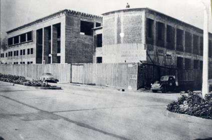 Construcción de la Escuela de Derecho de la Universidad de Chile, Sede Valparaíso, actualmente perteneciente a la Universidad de Valparaíso. Año 1948 Errázuriz 2120, Valparaíso, Chile